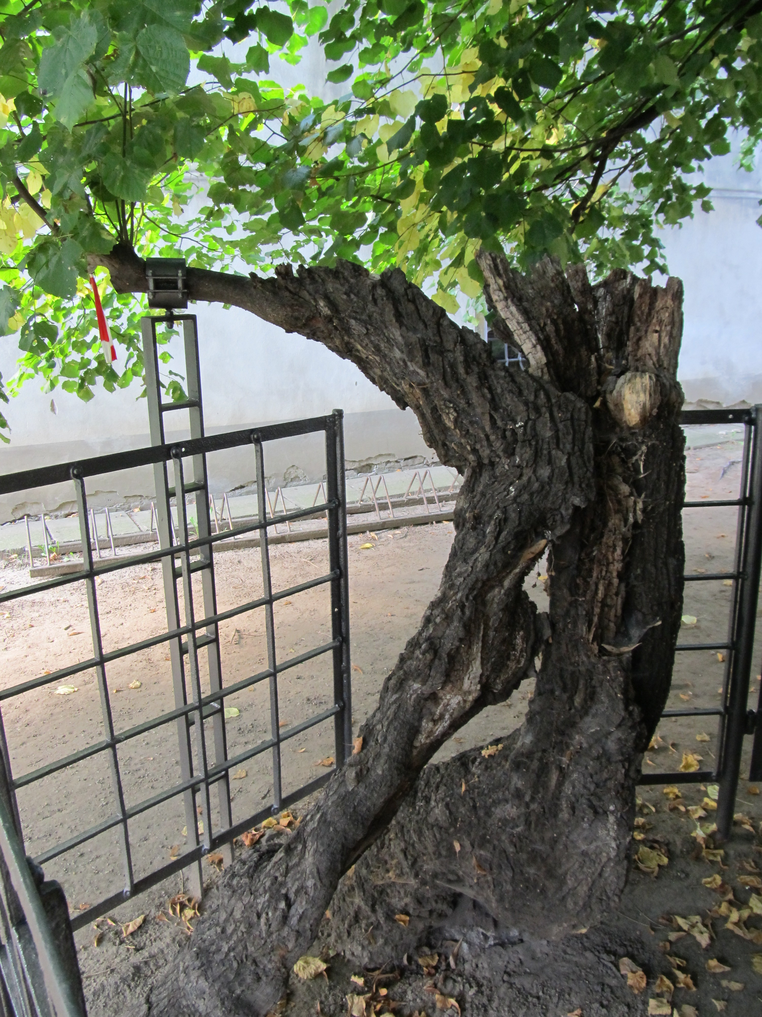 Kaditzer Linde, Dresden, kleiner verbliebener Seitenstamm